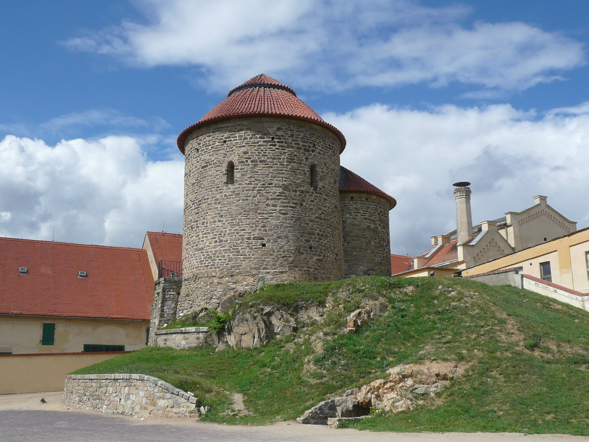 Románská rotunda sv. Kateřiny na hradě ve Znojmě.